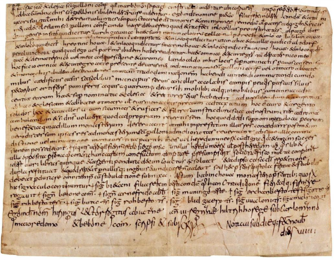 Urkundliche Erstnennung Thurgaus in einer Urkunde von um 745 (743-746), in der Orte im Tösstal und am oberen Zürichsee „in pago Durgaugense, in sito, qui dicitur Zurihgauvia“ zugeordnet werden (Ende 4. Zeile und Beginn 5. Zeile). Der Zürichgau hier als Untereinheit des grösseren Thurgaus.